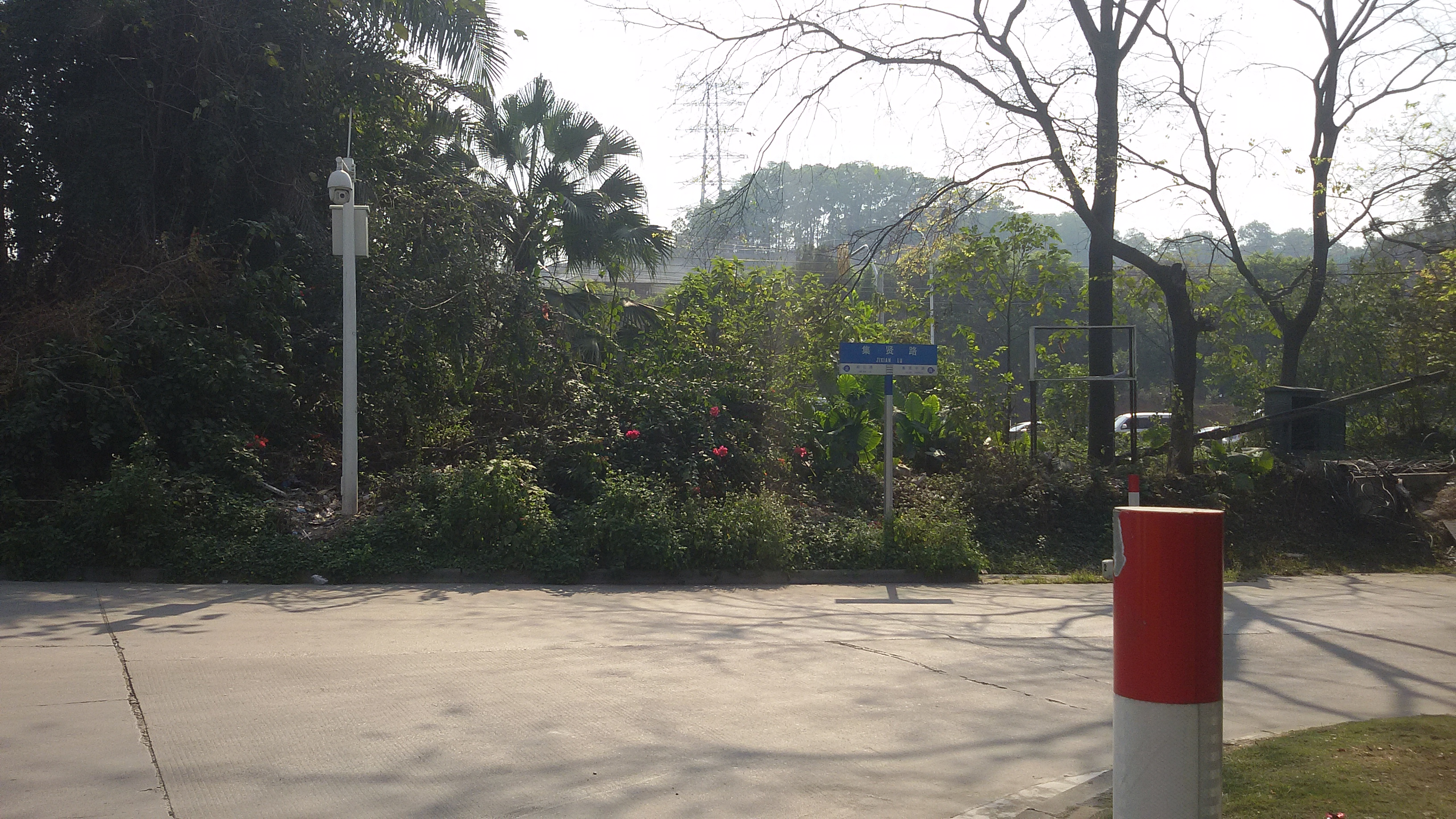 粵語: 集贤路